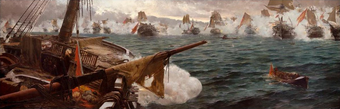 La obra representa la batalla de Trafalgar, que tuvo lugar el 21 de octubre de 1805 en el cabo de Trafalgar (Cádiz), entre la escuadra franco-española y la armada inglesa, resultando ésta última vencedora.